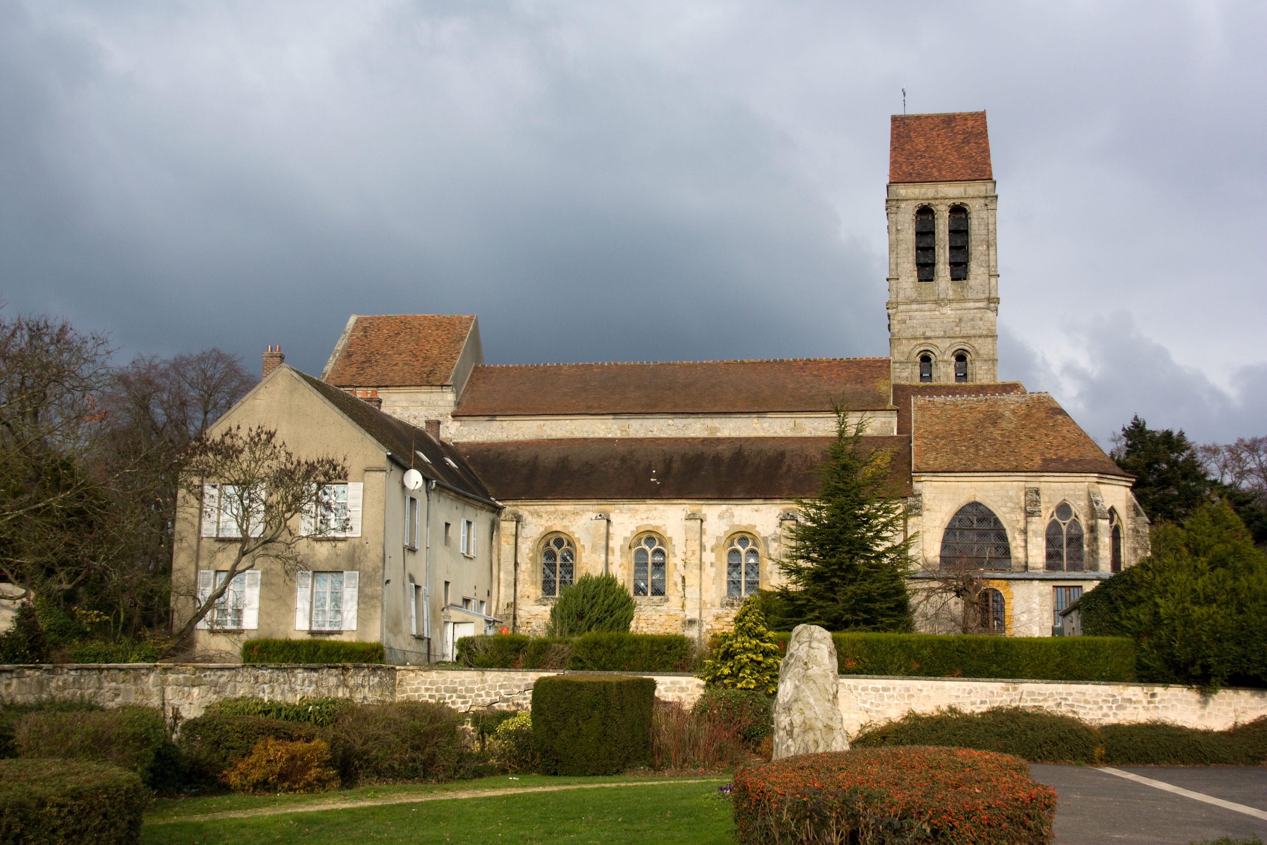 Église Saint-Côme-Saint-Damien de Luzarches, Luzarches, Val-d'Oise, France